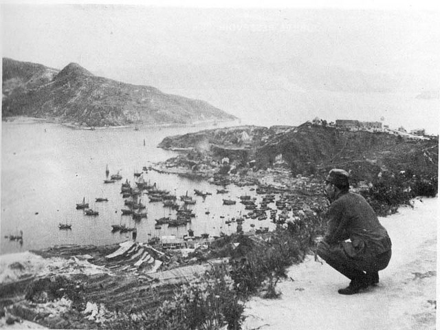 Colonel Tanaka overlooking Aldrich Bay